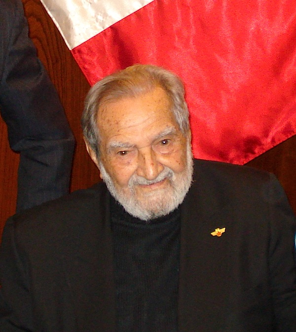 Armando Villanueva del Campo